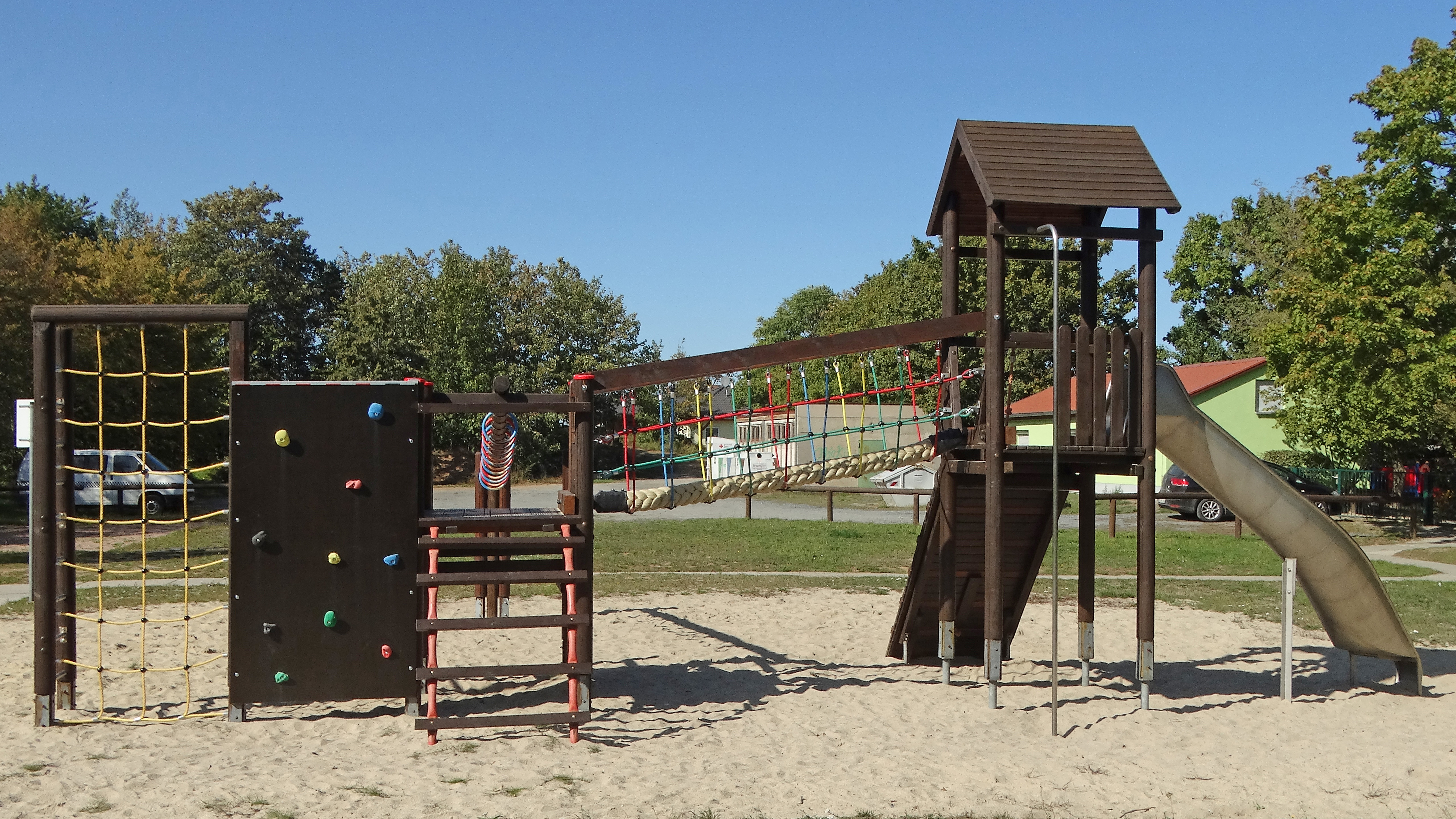 Kinderspielplatz mit Kletterseil, Kletterwand, Spielturm und Rutsche in Volkersdorf (Radeburg)